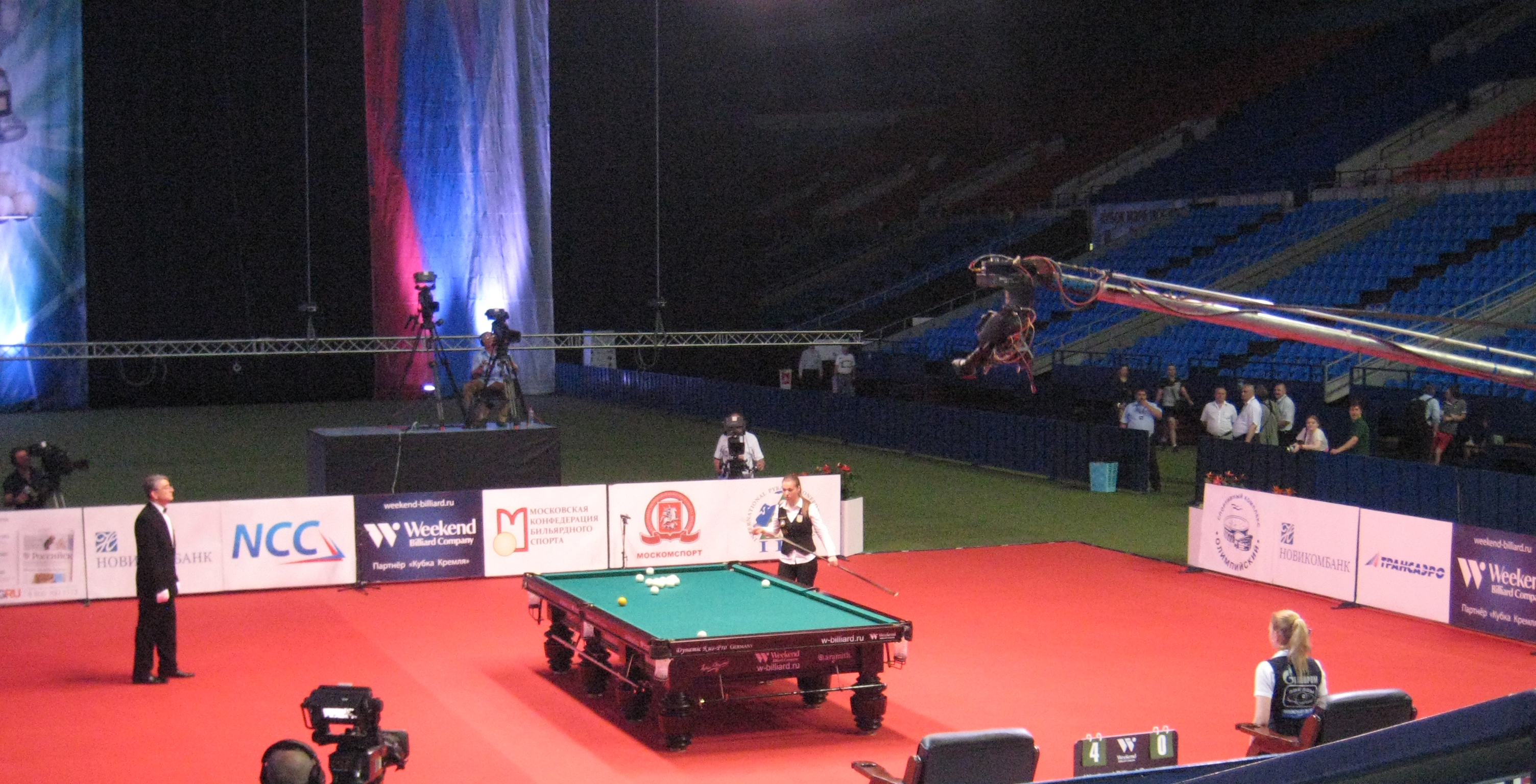 Финальный матч Кубка Мэра 2014 по бильярду в женском турнире между Анастасией Ковальчук и Дианой Мироновой